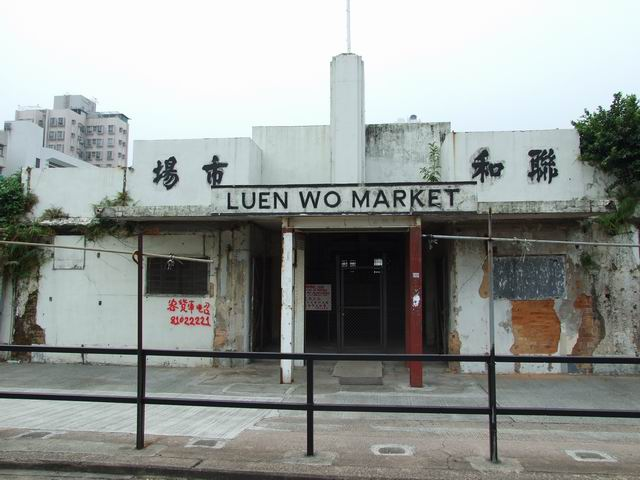 已停用的聯和墟舊街市